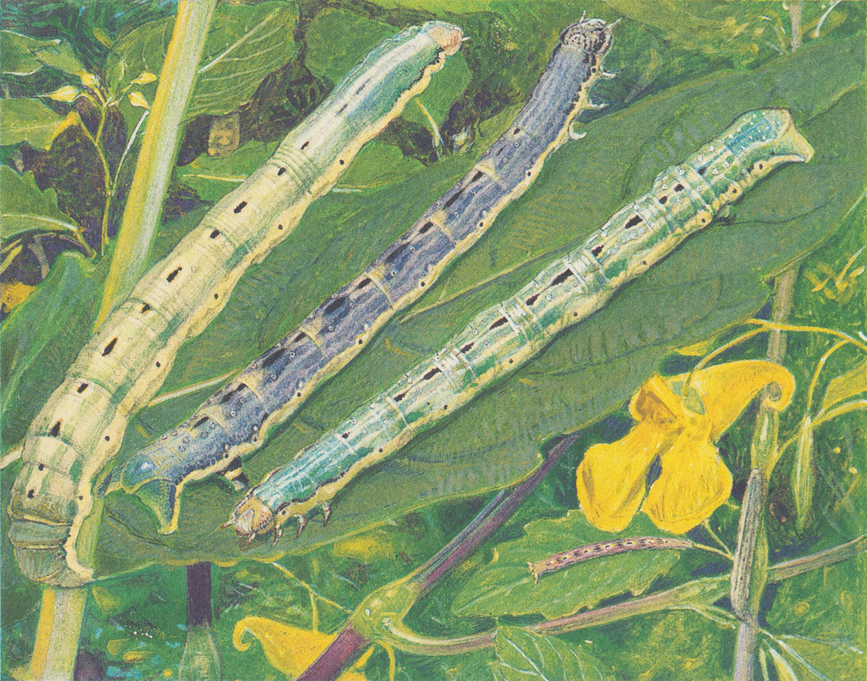 Raupen des Springkrautblattspanners (Xanthorhoe biriviata) auf Waldspringkraut (Impatiens noli-tangere)